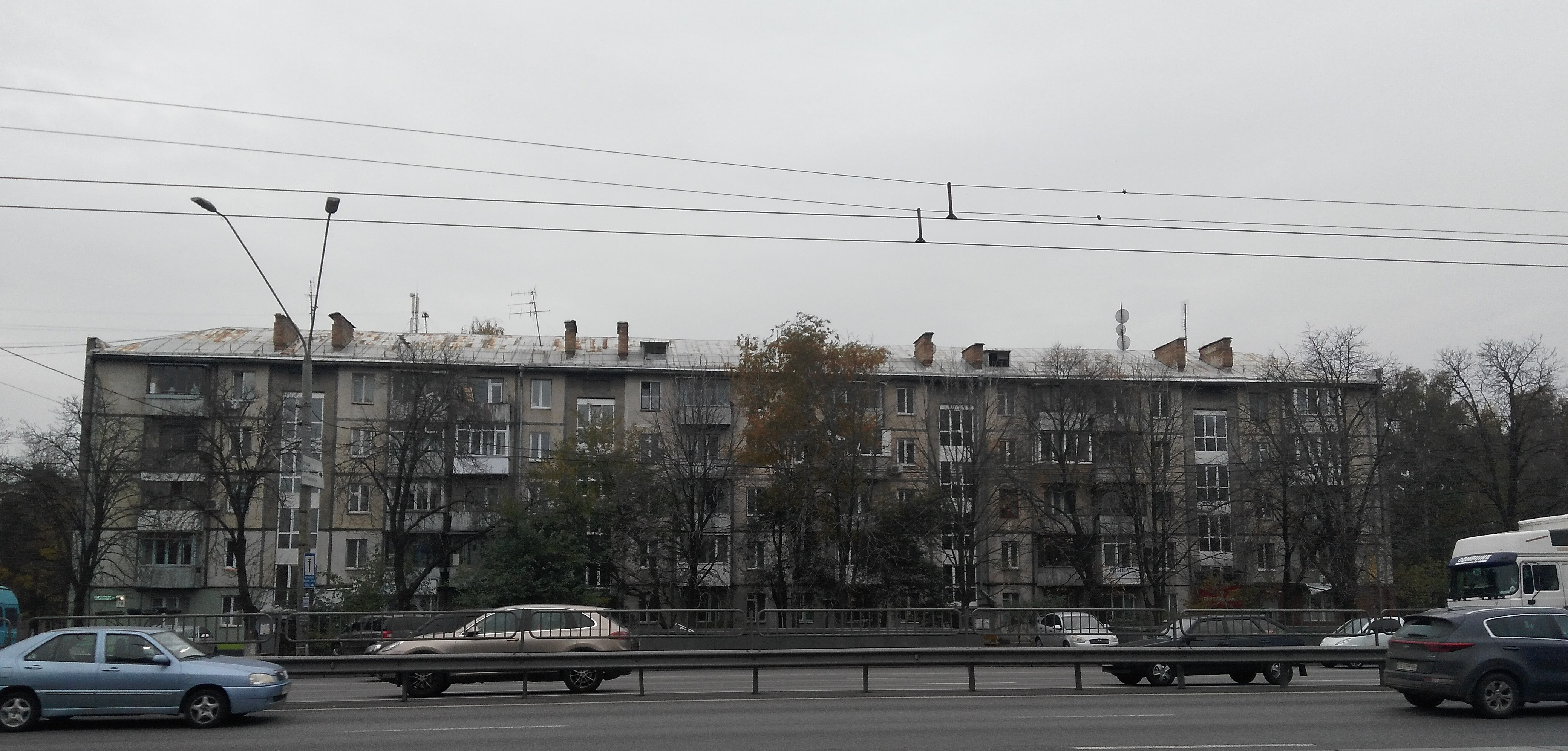 Панельна хрущовка на проспекті Перемоги, 79, Київ, Україна